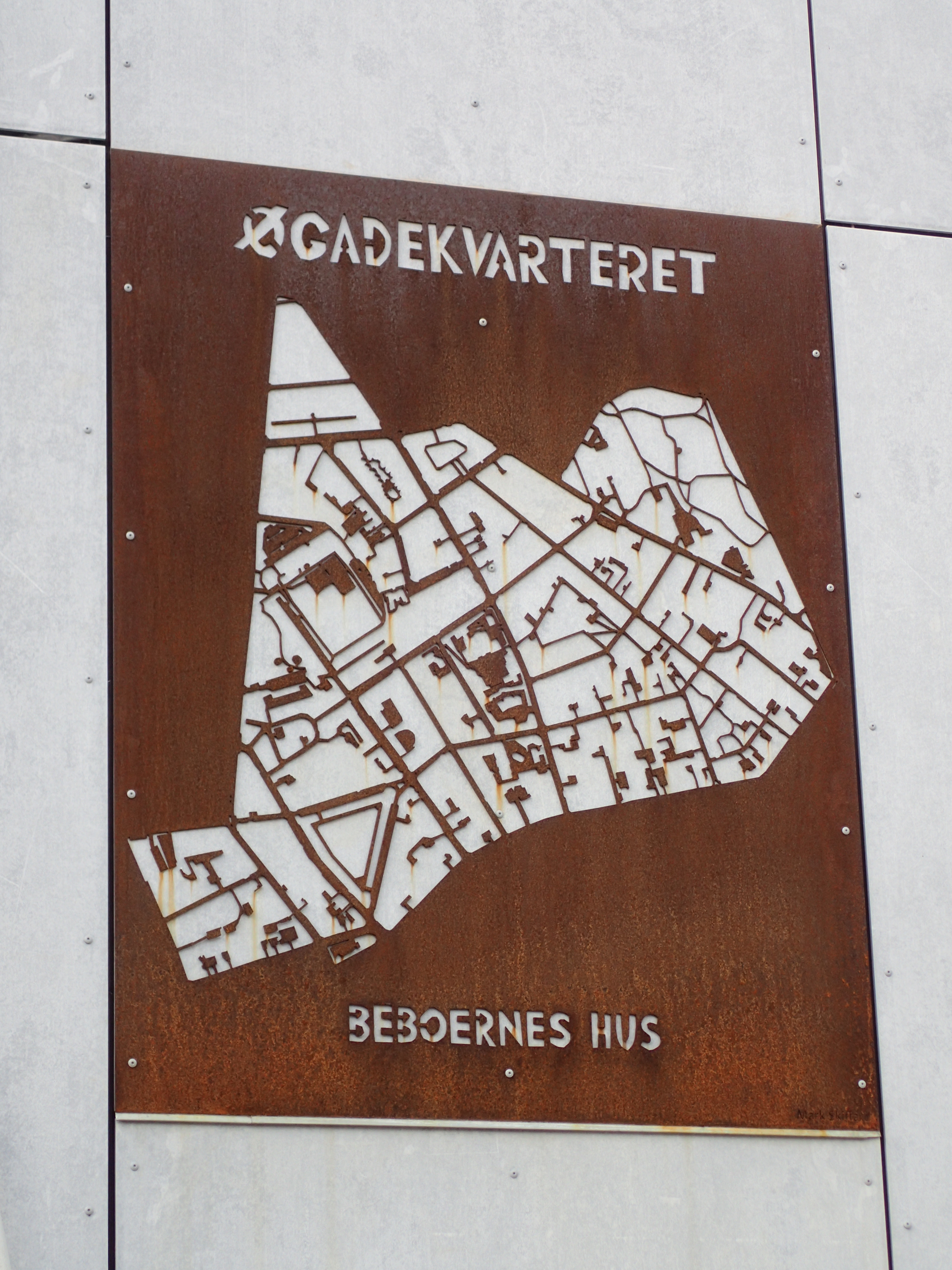 Øgadekvarteret i Aarhus.